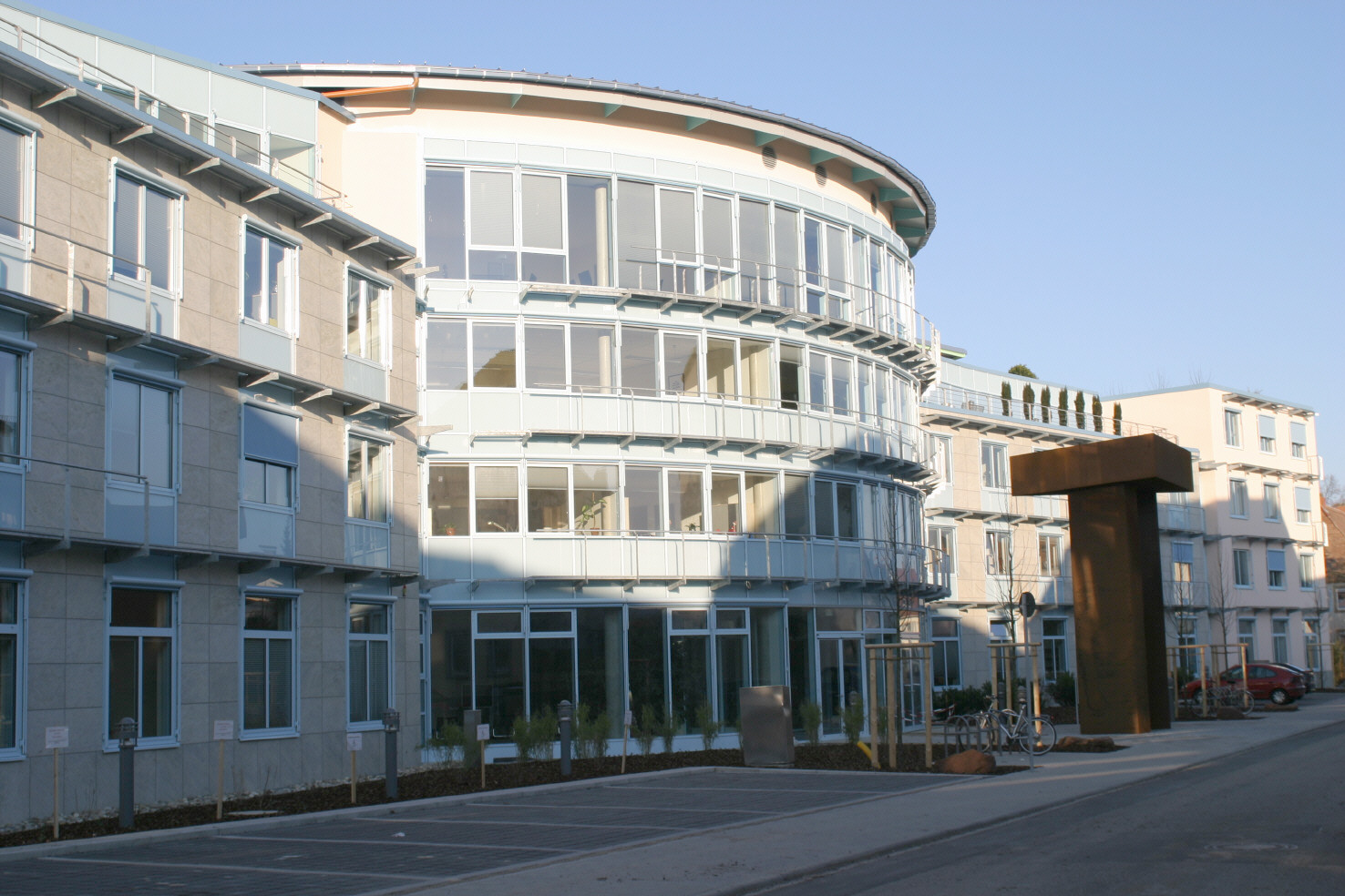 Das Bild zeigt die Hauptverwaltung der Deutschen Rentenversicherung Rheinland-Pfalz in Speyer.